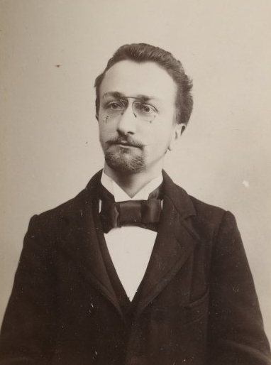 Alphonse Steinès en 1898